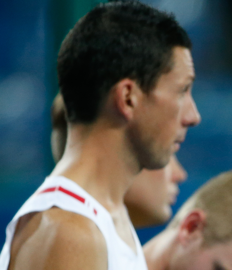 Rio de Janeiro - Prova dos 1500m T38 do atletismo nos Jogos Paralímpicos Rio 2016, vencida pelo tunisiano Abbes Saidi, no Estádio Olímpico.